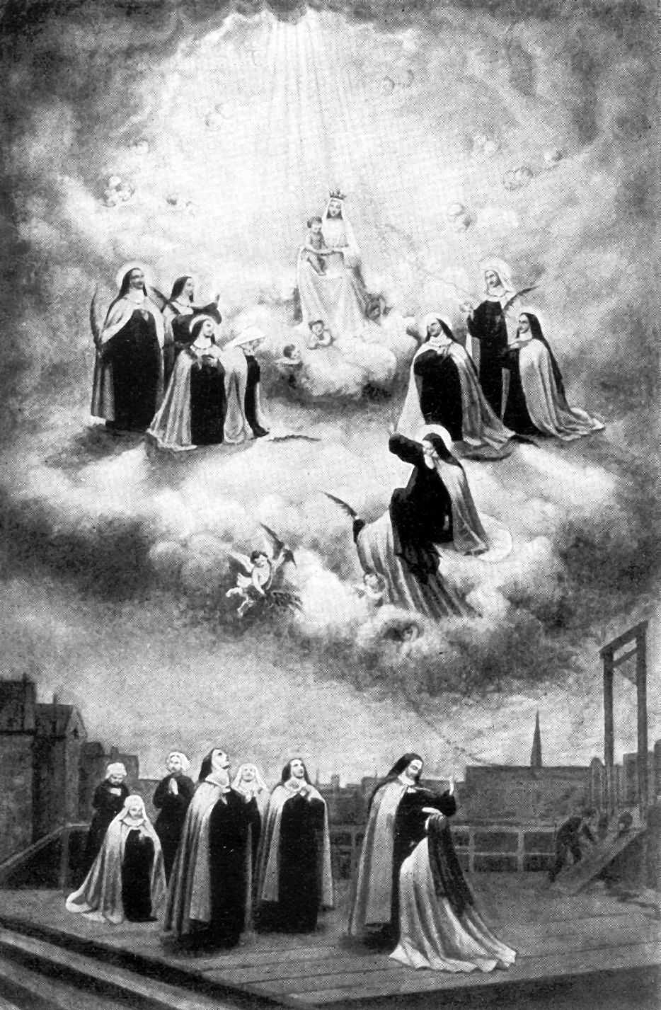 Les carmélites de Compiègne face à la guillotine. Illustration extraite de Louis David (o.s.b.), Les Seize Carmélites de Compiègne, leur martyre et leur béatification, 17 juillet 1794 - 27 mai 1906, Paris, H. Oudin, [1906].